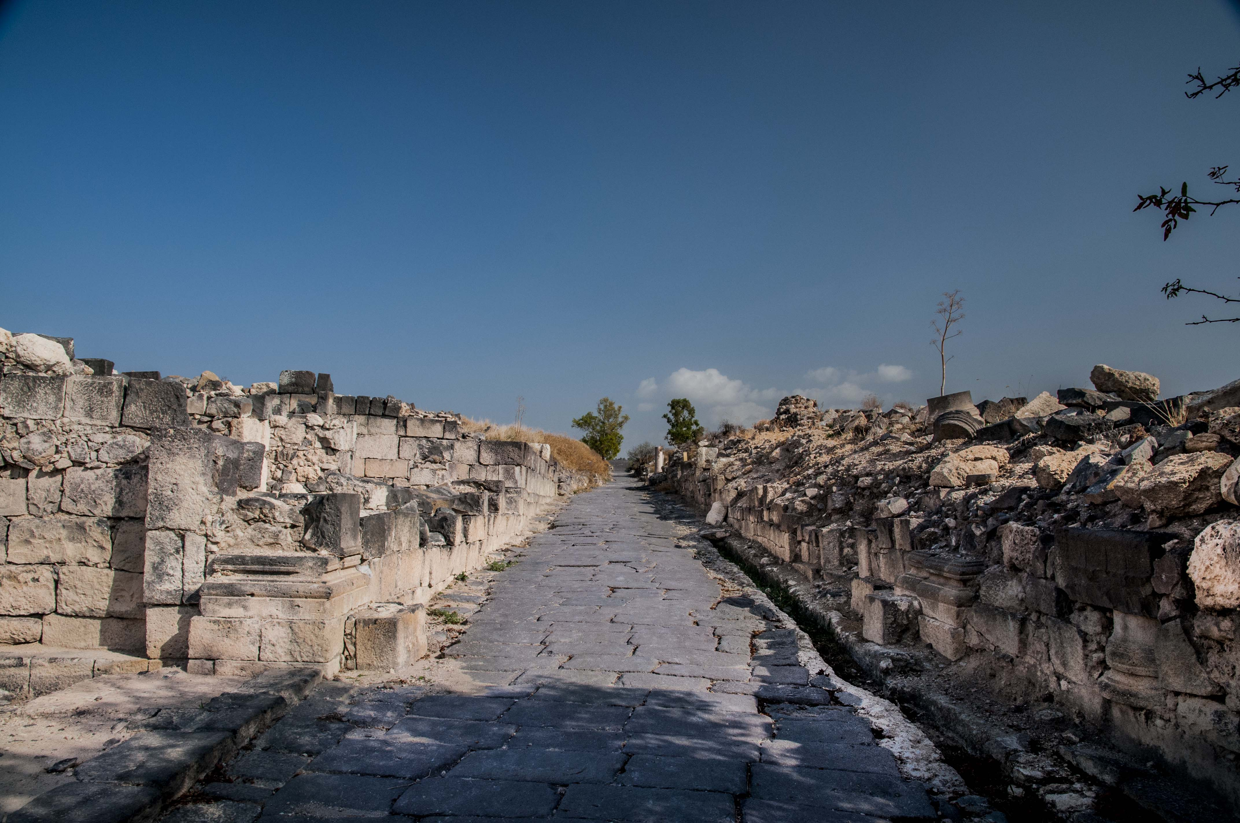 סוסיתא נוסדה כעיר מדינה (פוליס) ככל הנראה באמצע המאה ה-2 לפנה"ס בידי הממלכה הסלאוקית.